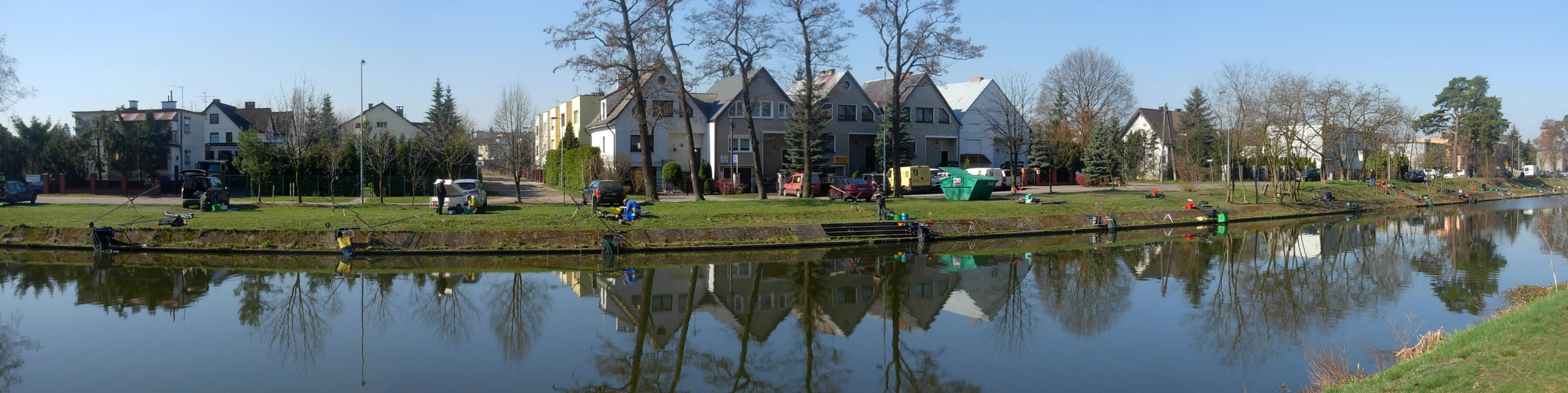 Teren nad Kanałem Bydgoskim na osiedlu Miedzyń w Bydgoszczy